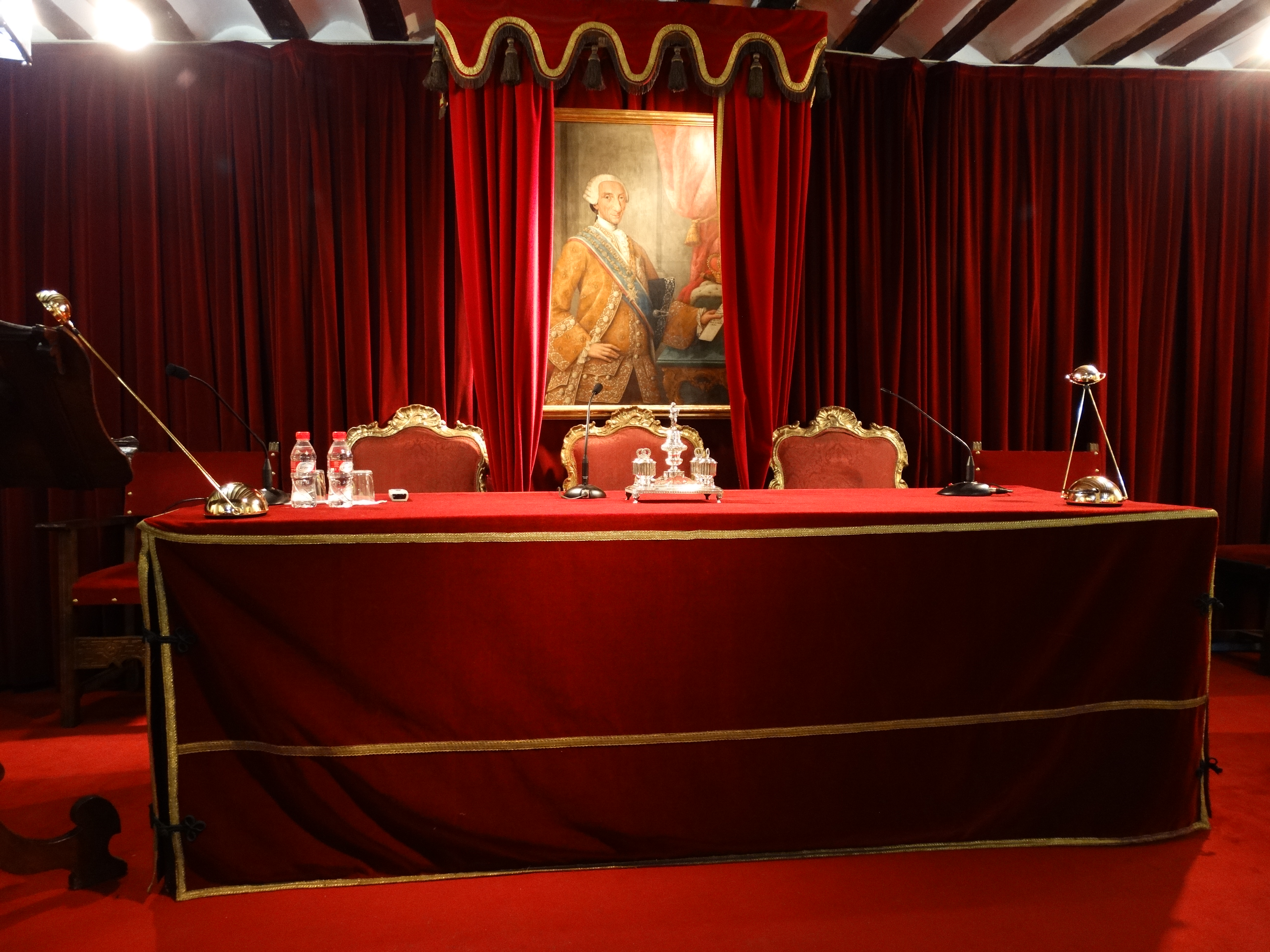 Salón de actos de la Academia. Inauguración del curso académico 2014-2015. Esperando a los académicos.